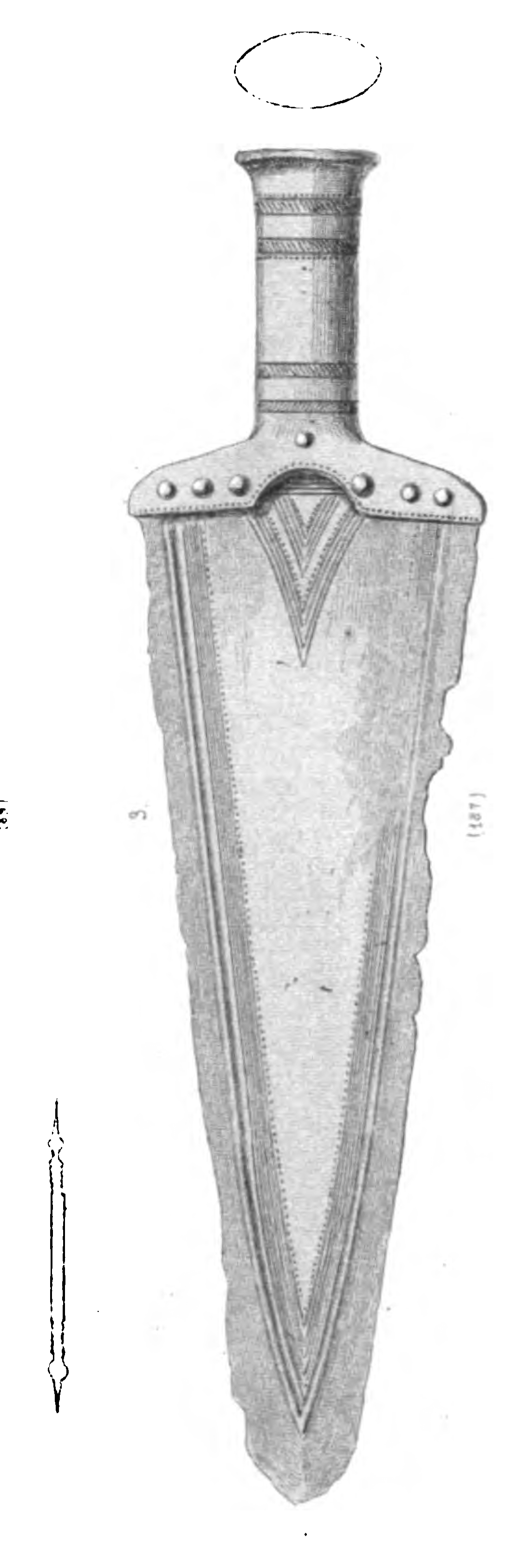 Dolch "Oder-Elbe-Typus"; Stammt aus dem Dolchhort von Gau-Bickelheim